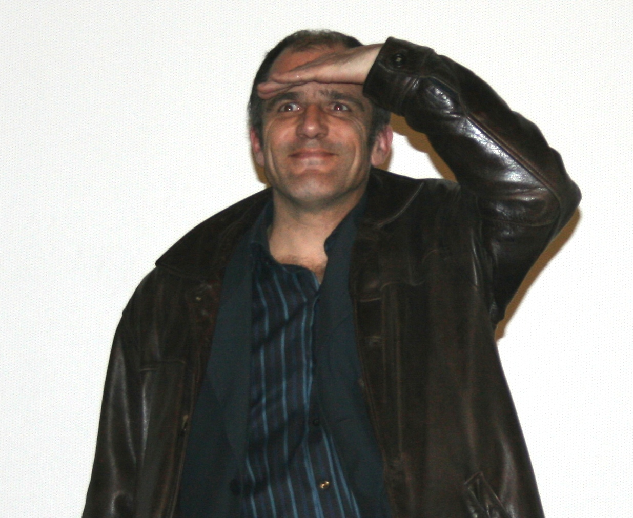 Frédéric Pierrot à l'avant-première d'Il y a longtemps que je t'aime diffusée à l'UGC Ciné Cité Bercy, à Paris.